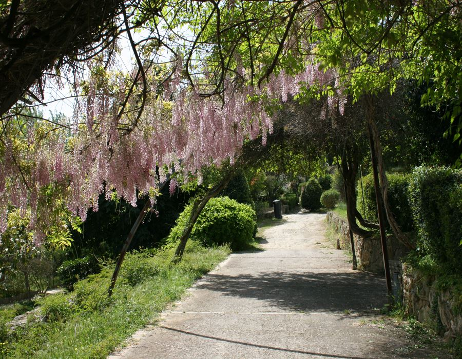 Interno del parco